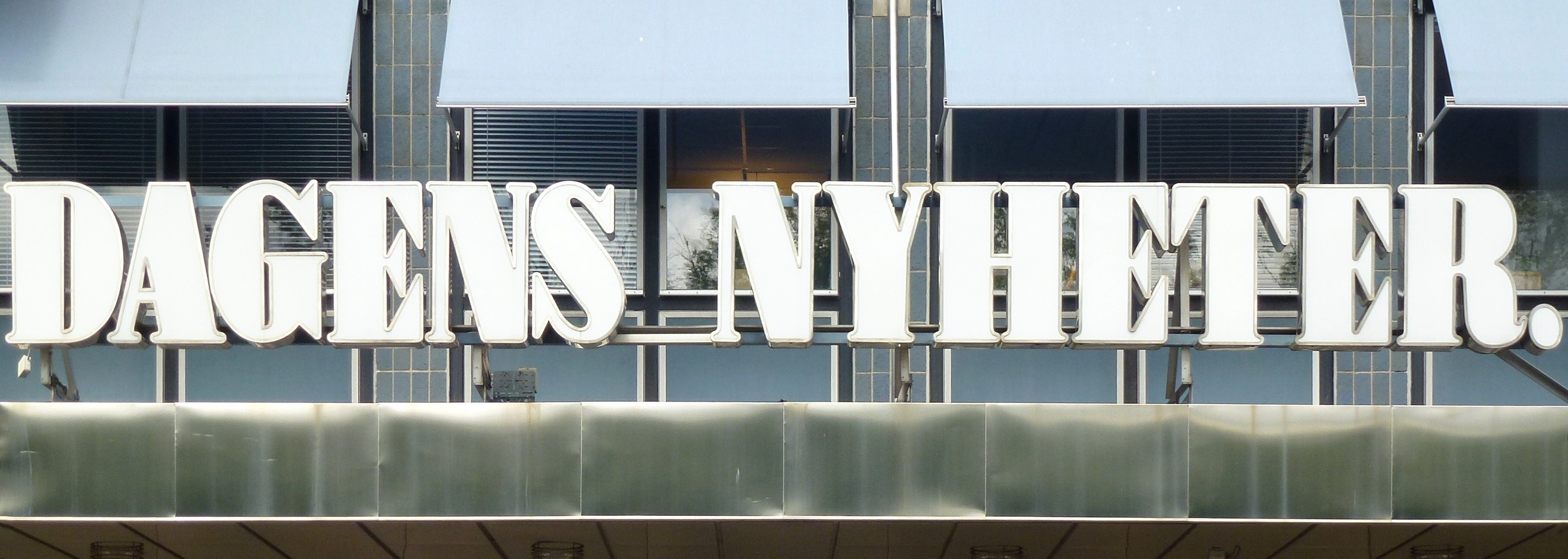 Dagens Nyheter text på lågdelen